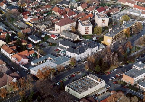 Kiskőrös, Hungary, aerialphotography